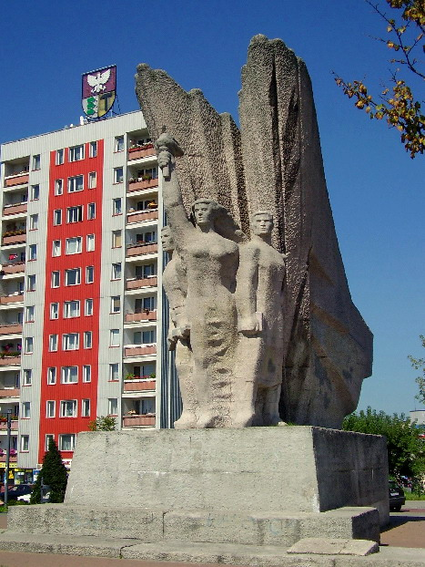 zasady rozpowszszechniania autor W.Grabowski